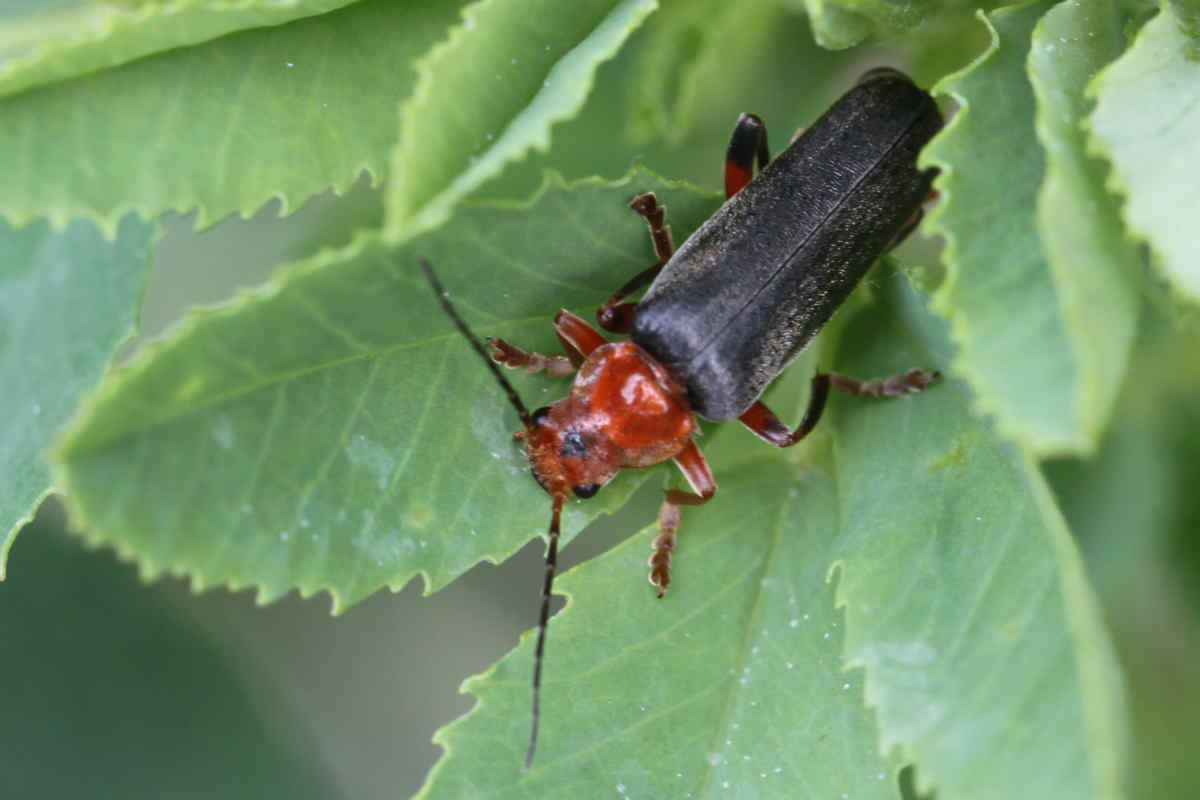 Cantharis livida (dunkle Form), am 9.5.2017 am Rheinufer südlich Mannheim